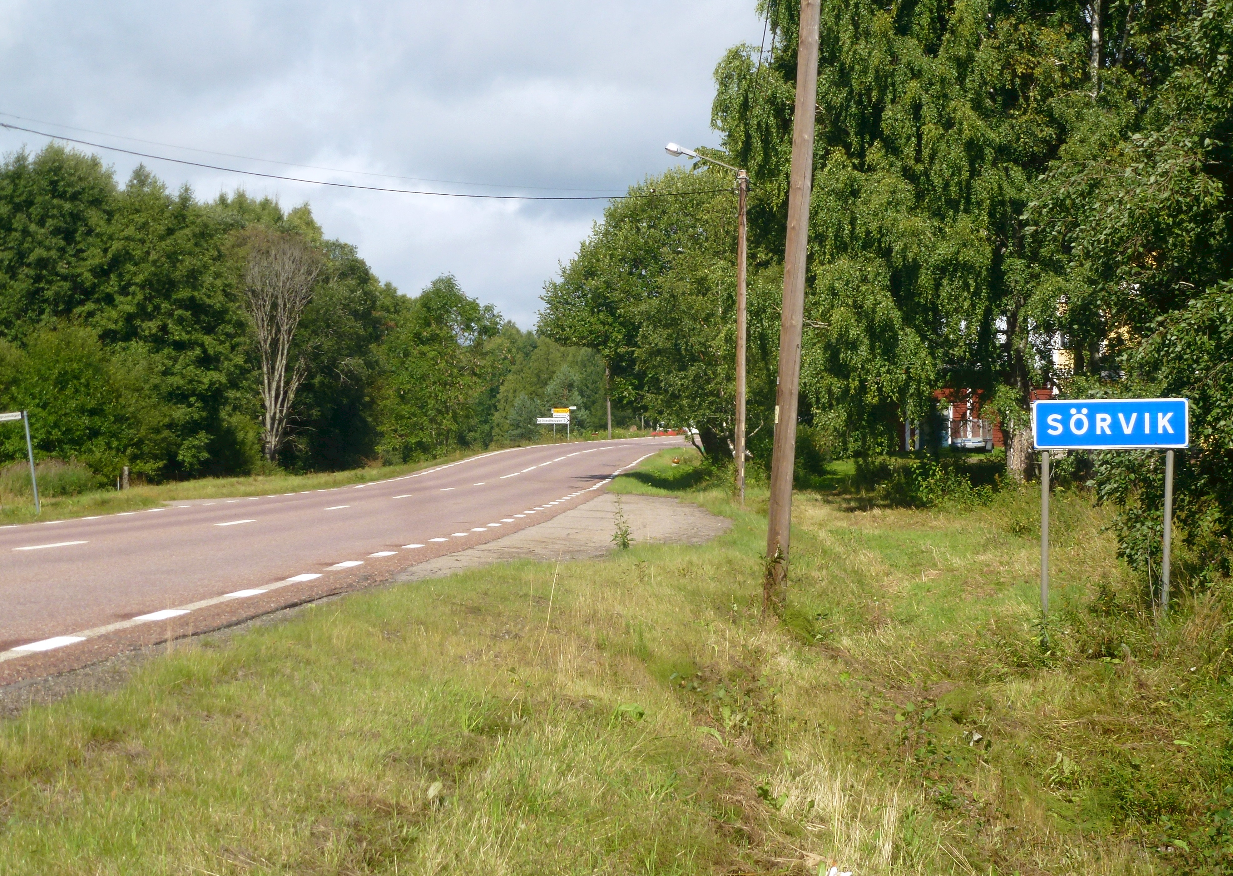 Sörvik och rv 66, vy mot norr